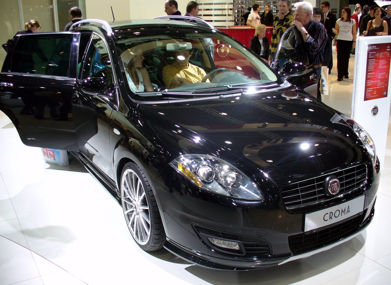 Fiat Croma Facelift